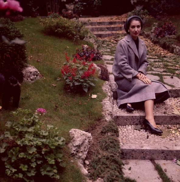 Milano - Abitazione di Maria Callas: esterno